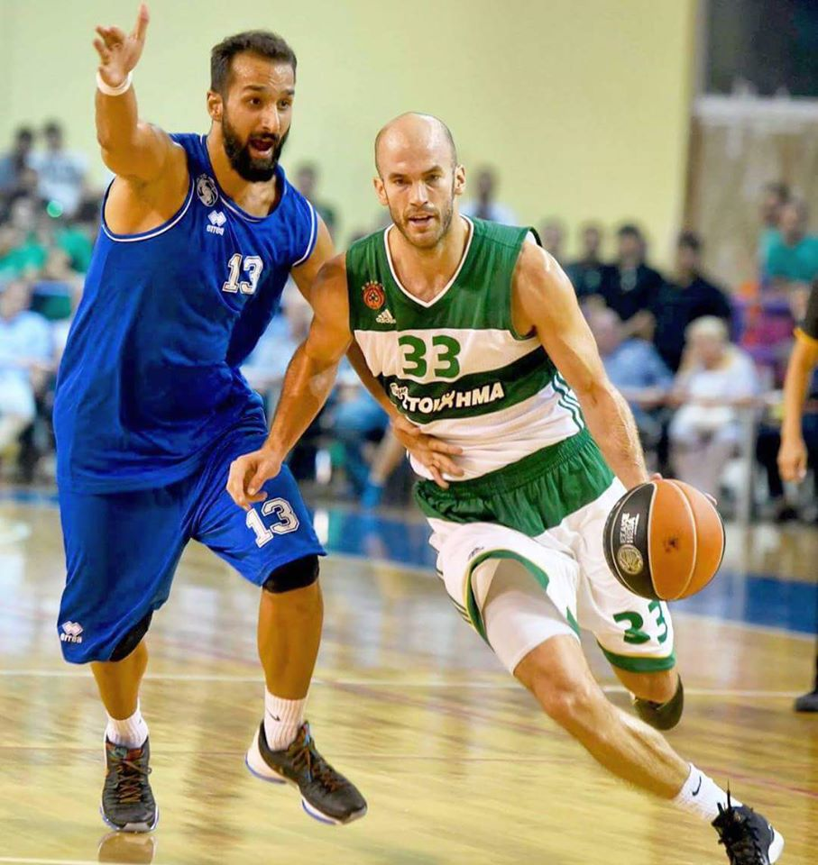 Konstantakopoulos against Panathinaikos